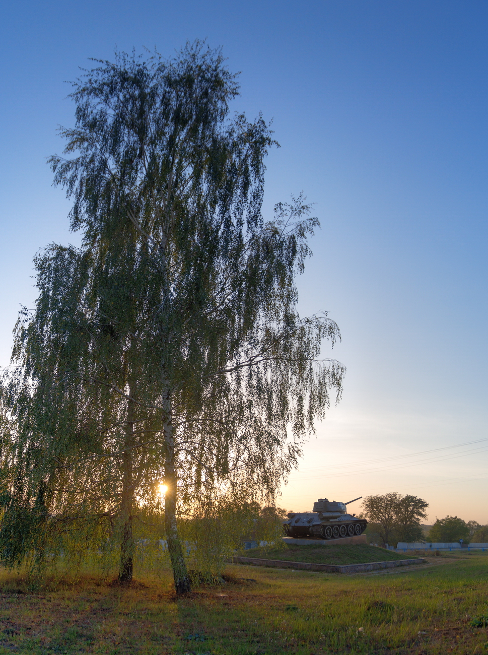 Пам'ятник воїнам-танкістам, Житомирський район, с. Висока Піч , Високопічська с/р